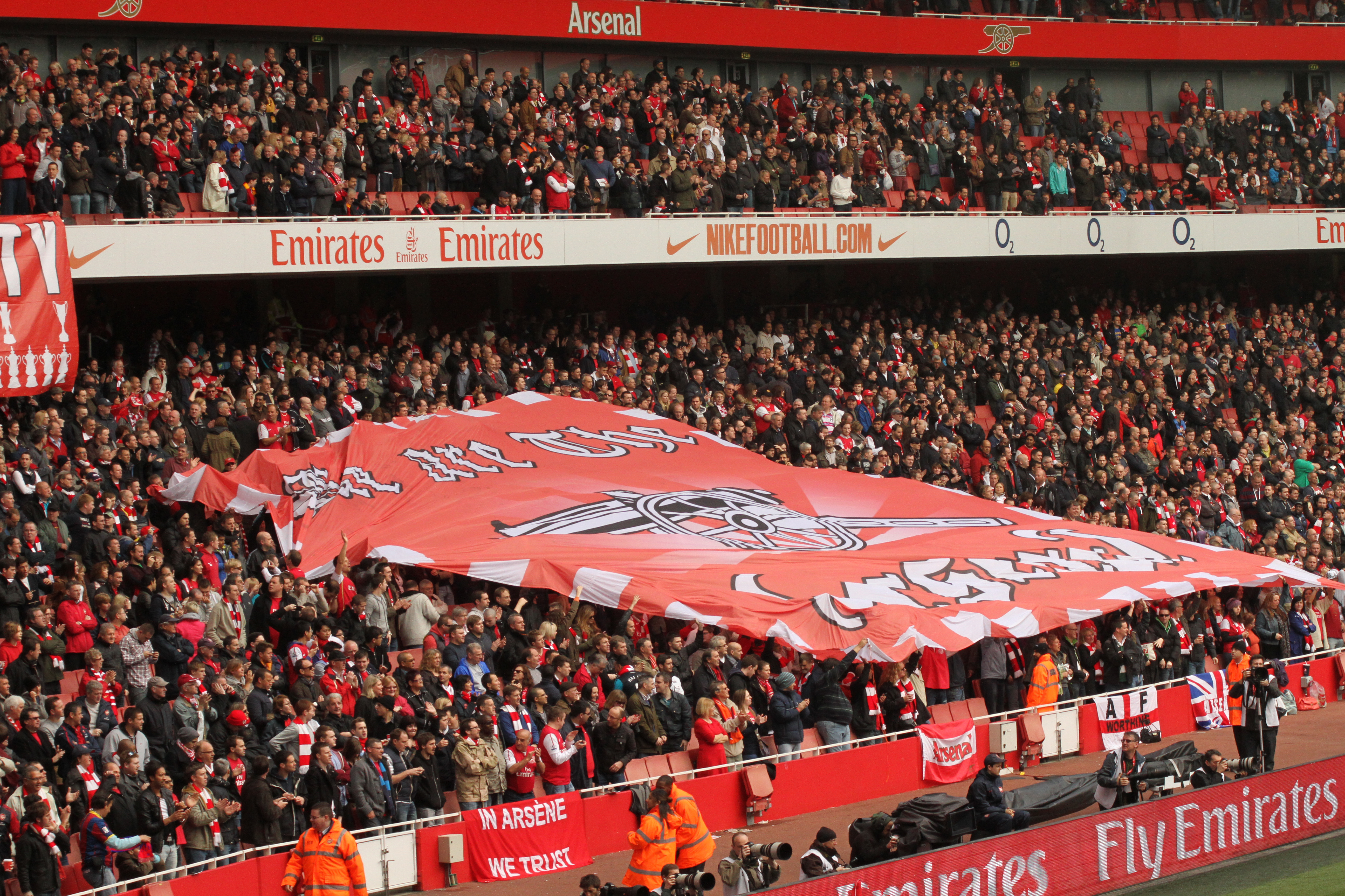 Arsenal Flag